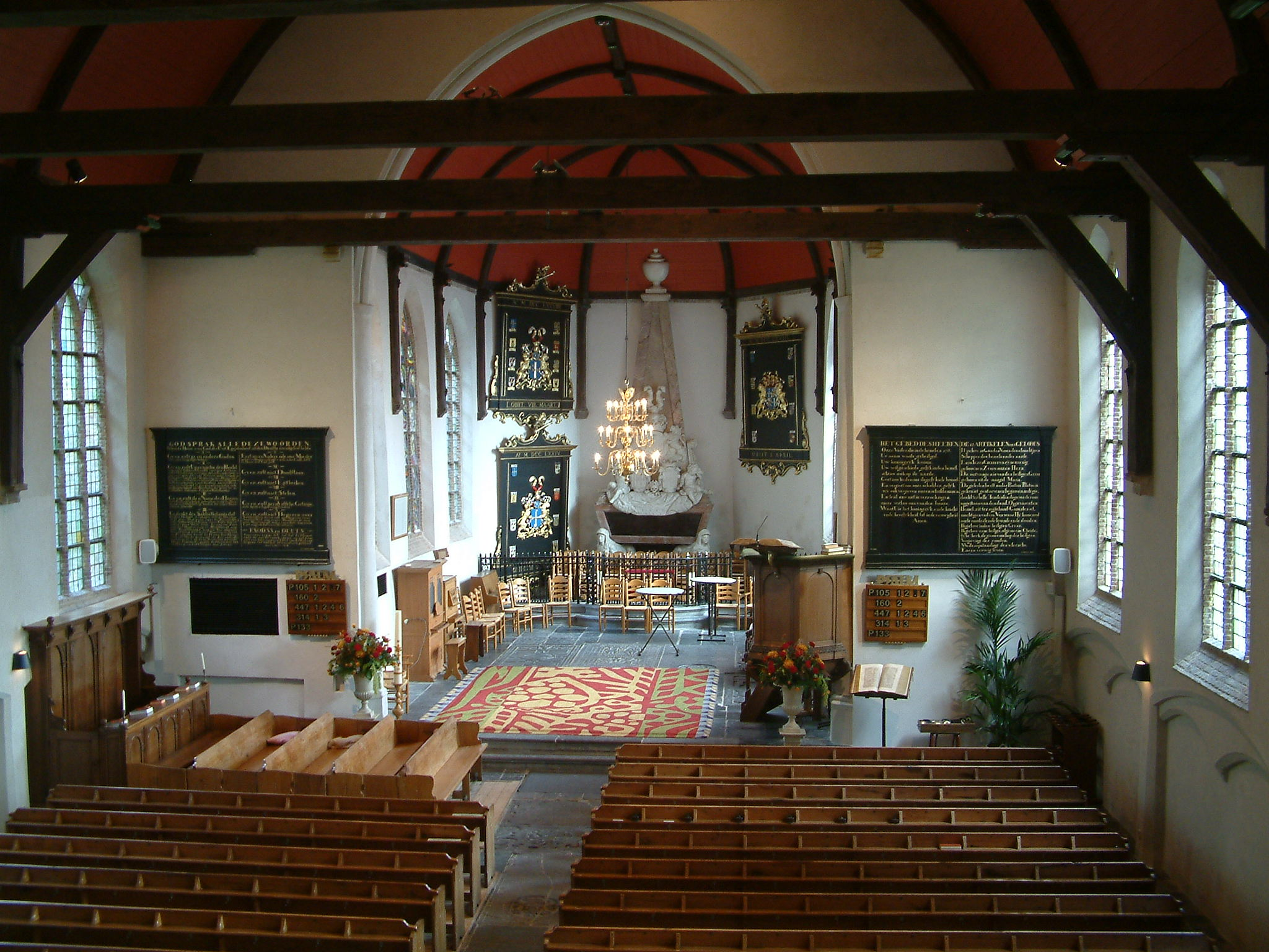 Hervormde kerk van Rhoon Koor